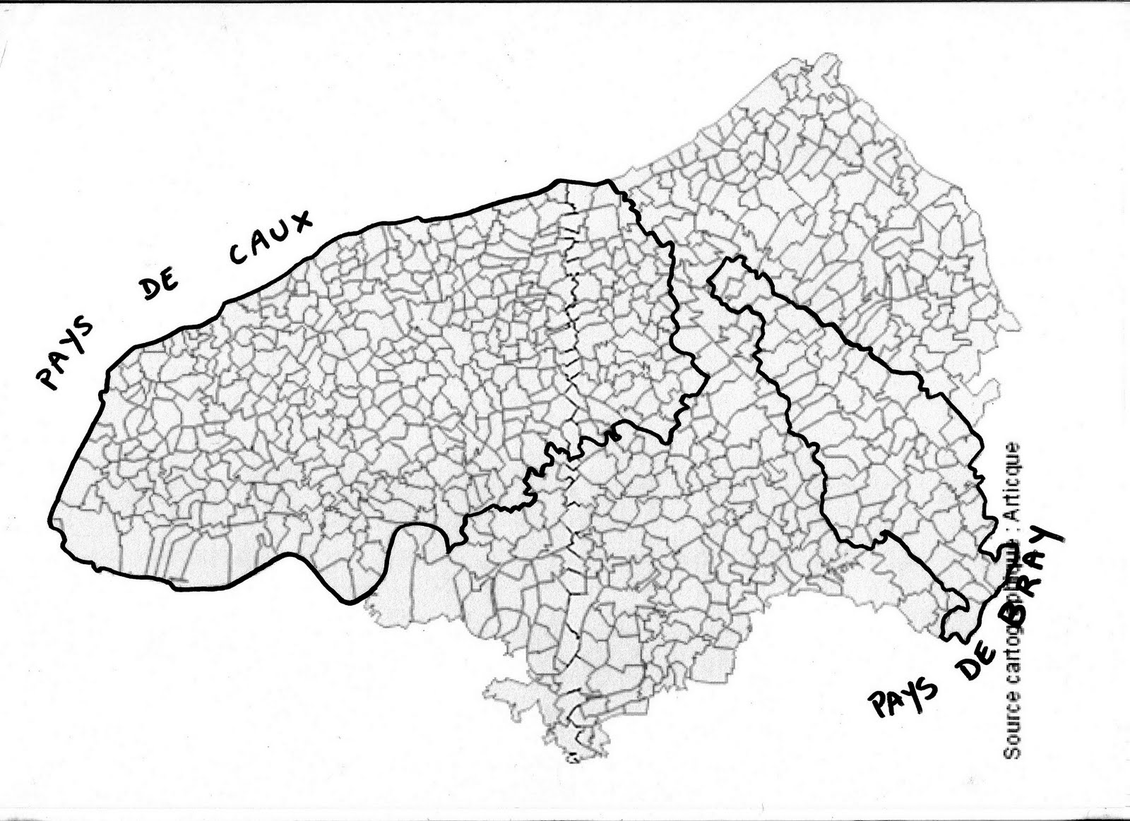 Ce travail a été effectué essentiellement sur la base des travaux de Georges Lecarpentier Jules Sion et Raymond Mensire